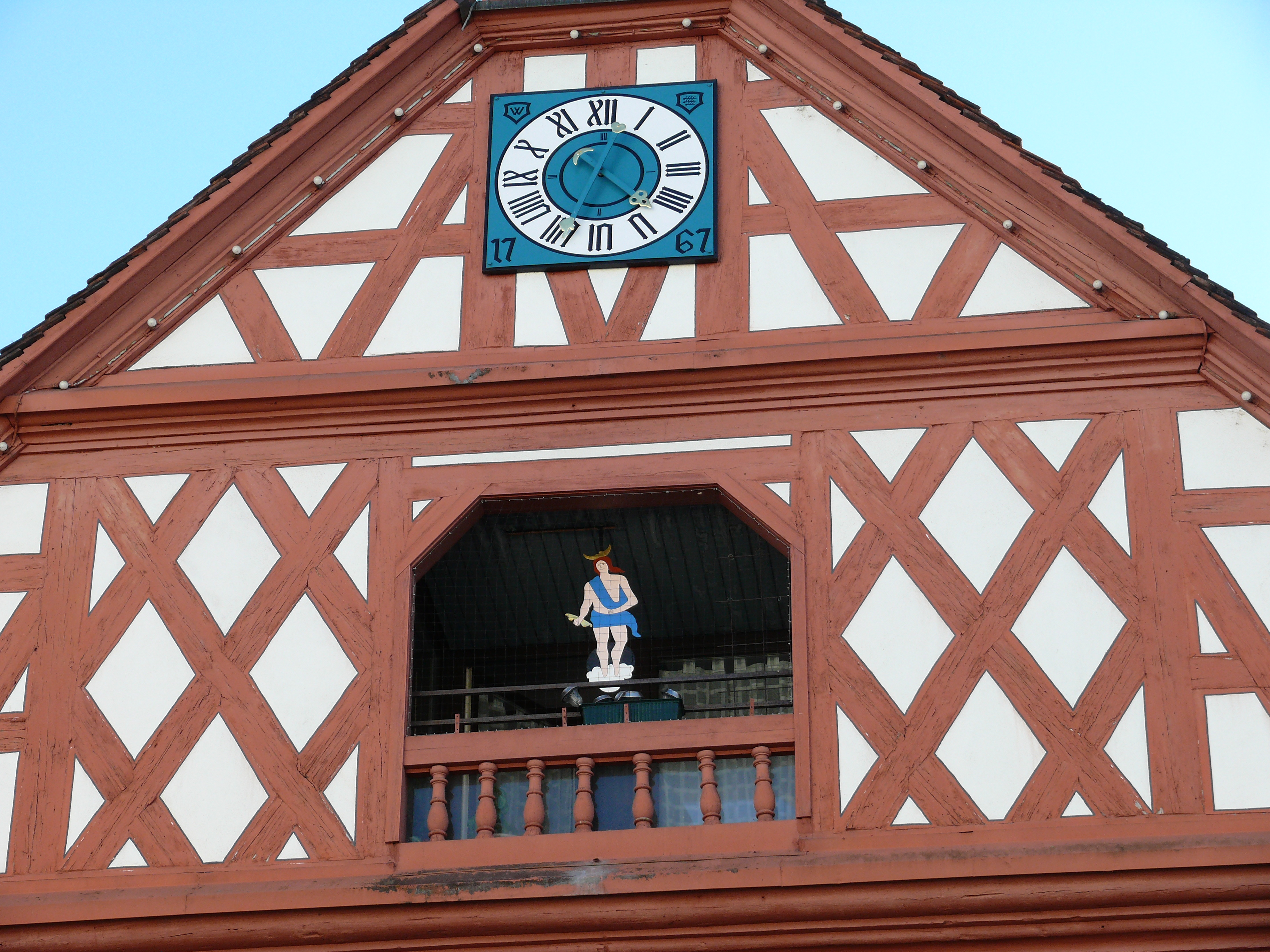 Das Alte Rathaus auf dem Marktplatz in Waiblingen. Dachbereich mit Uhr.